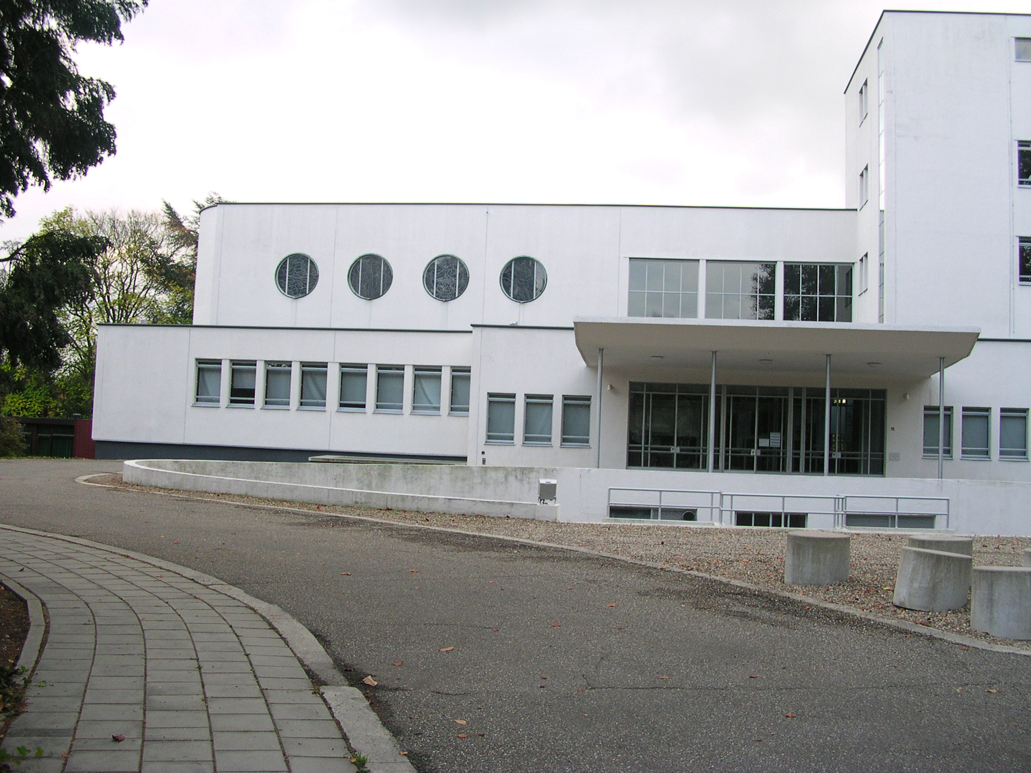 “Monseigneur-Laurentius-Schrijnen-huis” am Molenberg in Heerlen, Architekt Frits Peutz